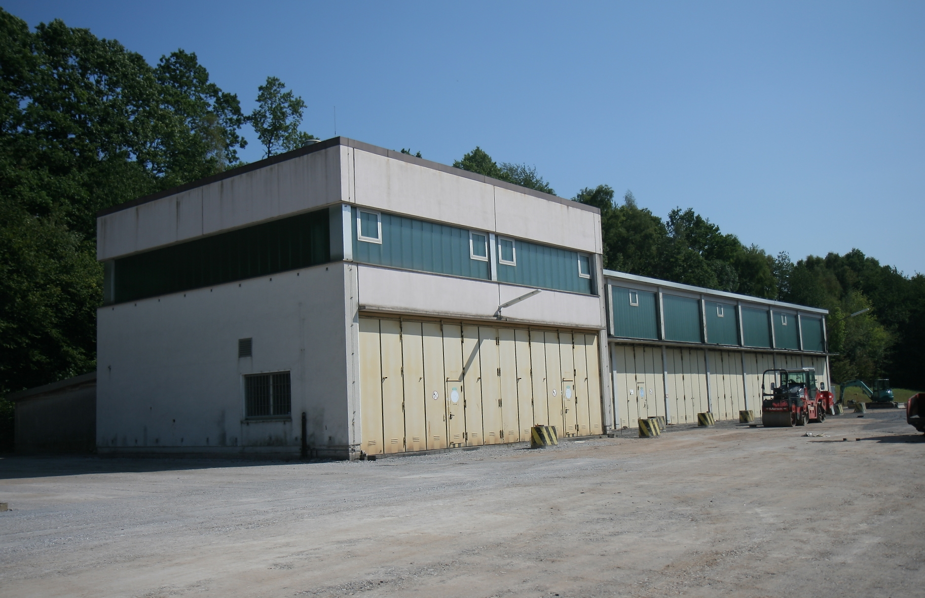 Ehemalige Panzerhalle der Blücher-Kaserne in Hemer.